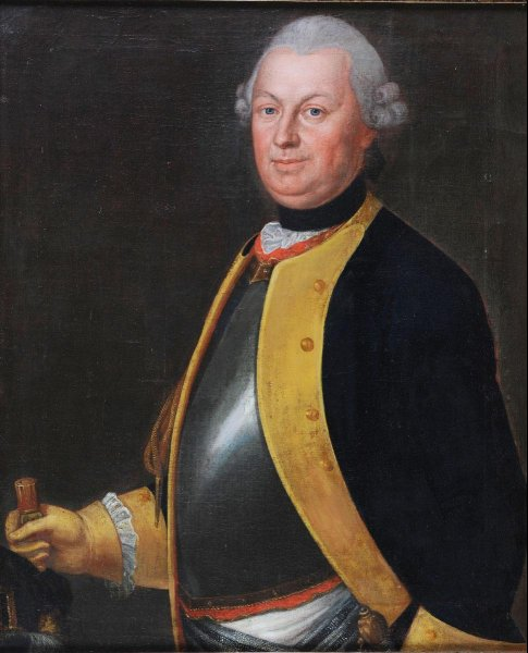 Porträt des preußischen Generalleutnants Baron Wenzeslaus Christoph von Lehwaldtt (* 18. Februar 1717 auf Gut Ublick bei Johannisburg in Ostpreußen; † 27. Dezember 1793)